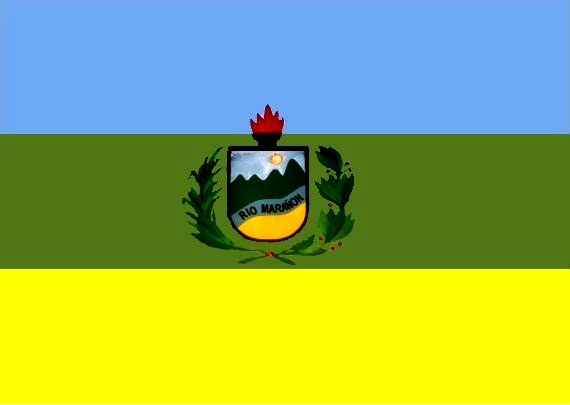 Diseñe la Bandera de la Provincia de Huacaybamba